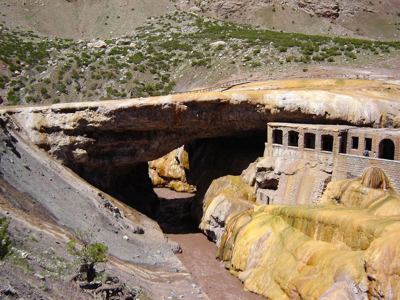 Puente del Inca, near the entrance to Parque Provincial Aconcagua, ARG